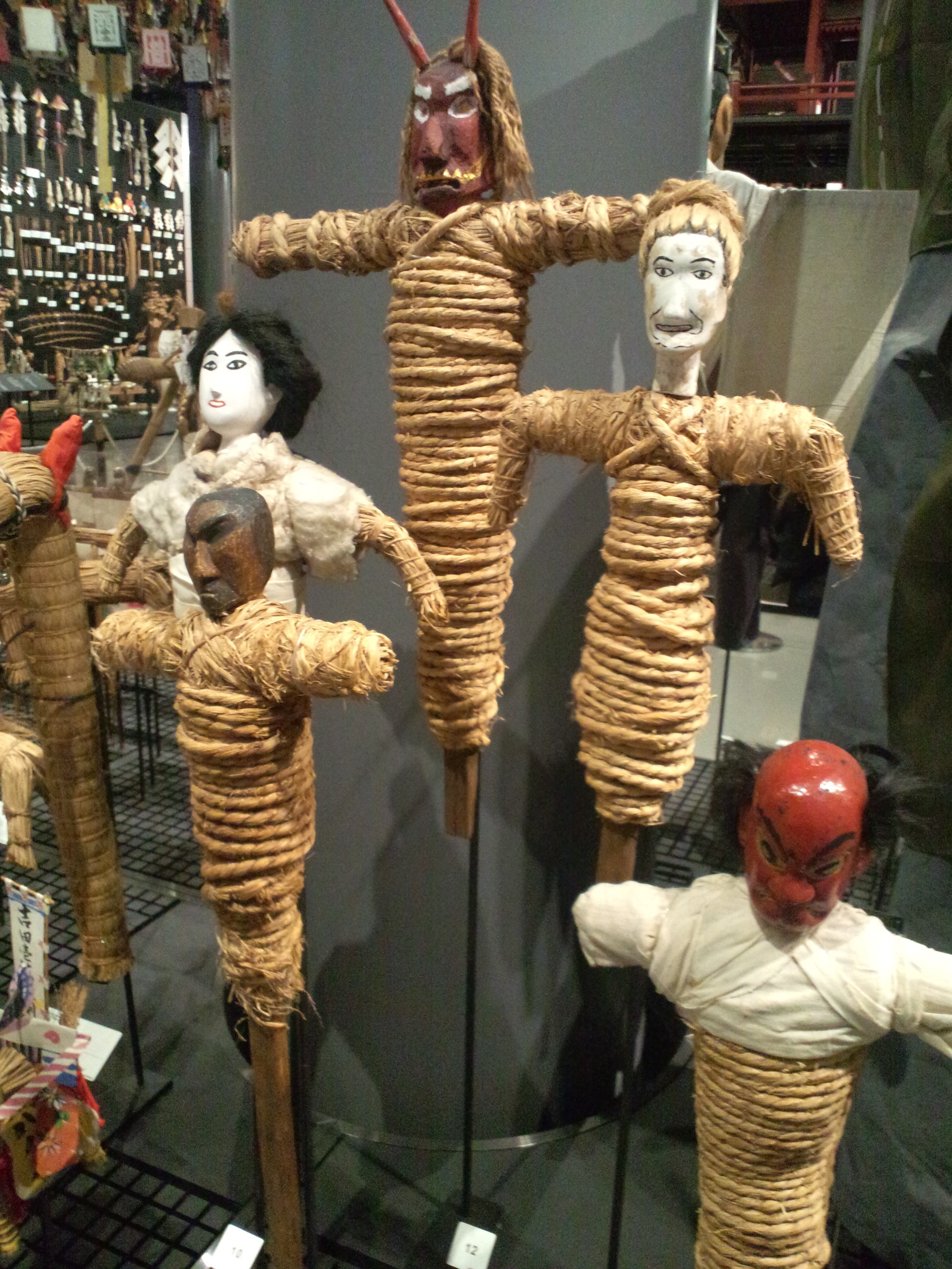 国立民族学博物館（大阪） でく（石川県、白山市、1978年製作）